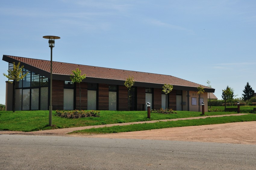 Feusines (Indre) - Mairie